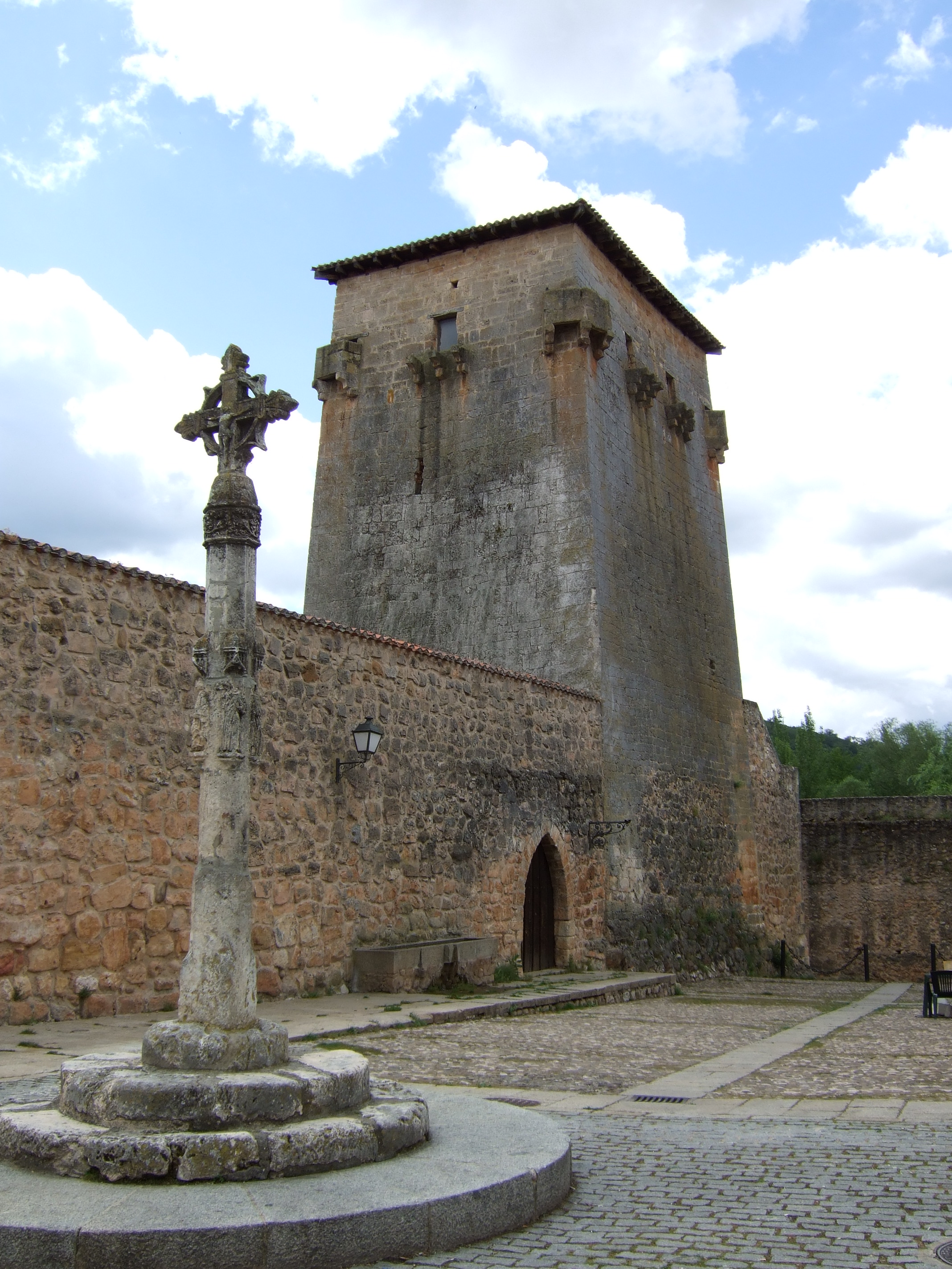 Covarrubias - Torreón de Fernán González (s. X), también llamado Torreón de Doña Urraca, con crucero gótico (s. XVI) al frente